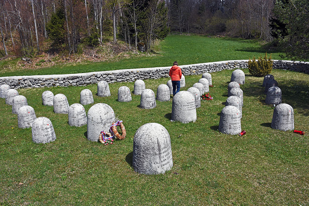 Vojsko, partizansko grobišče